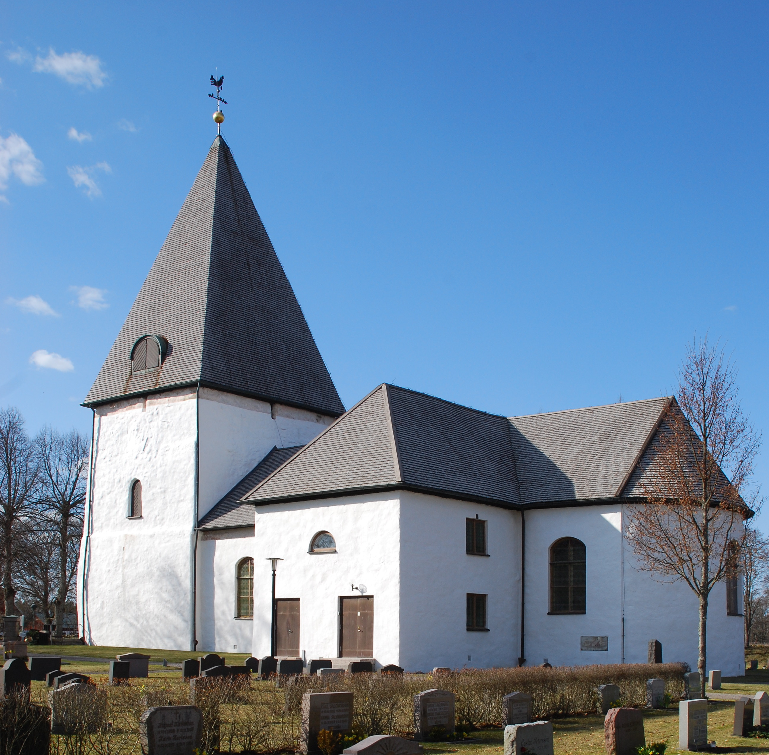 Bergunda kyrka från sydost